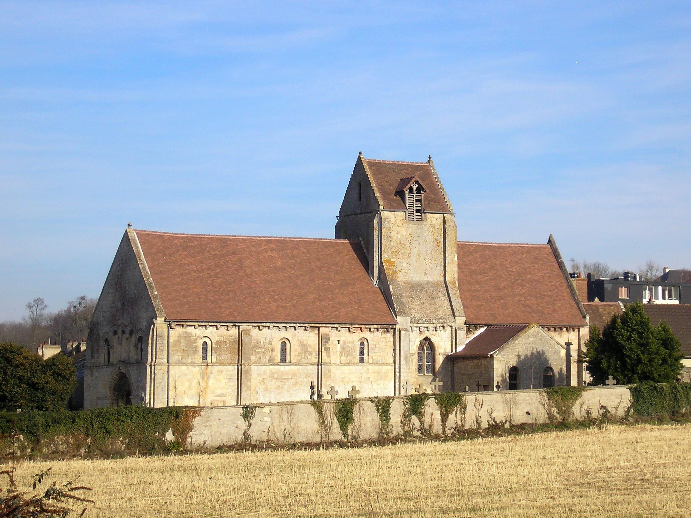 Église Saint-Martin de Colombelles (Calvados, France), inscrite à l'inventaire supplémentaire des monuments historiques (ISMH, 16/05/1927).